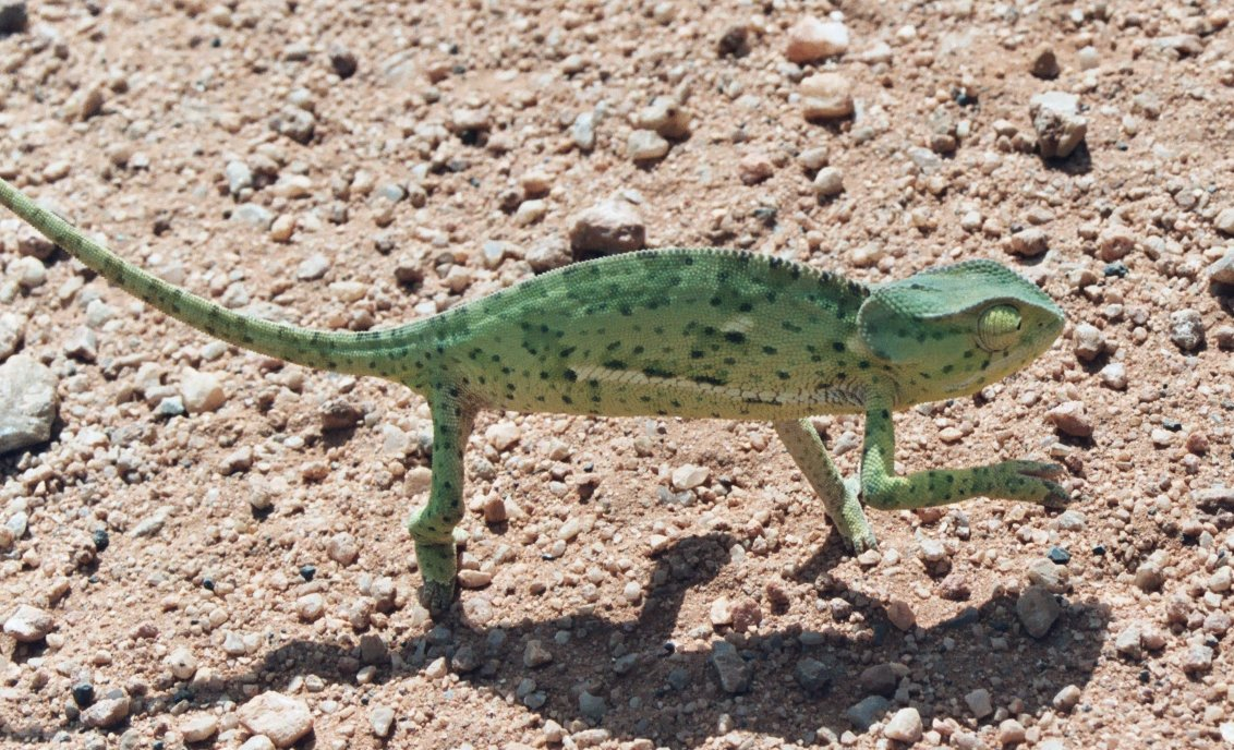 Eigen werk, Zambia, april 2004